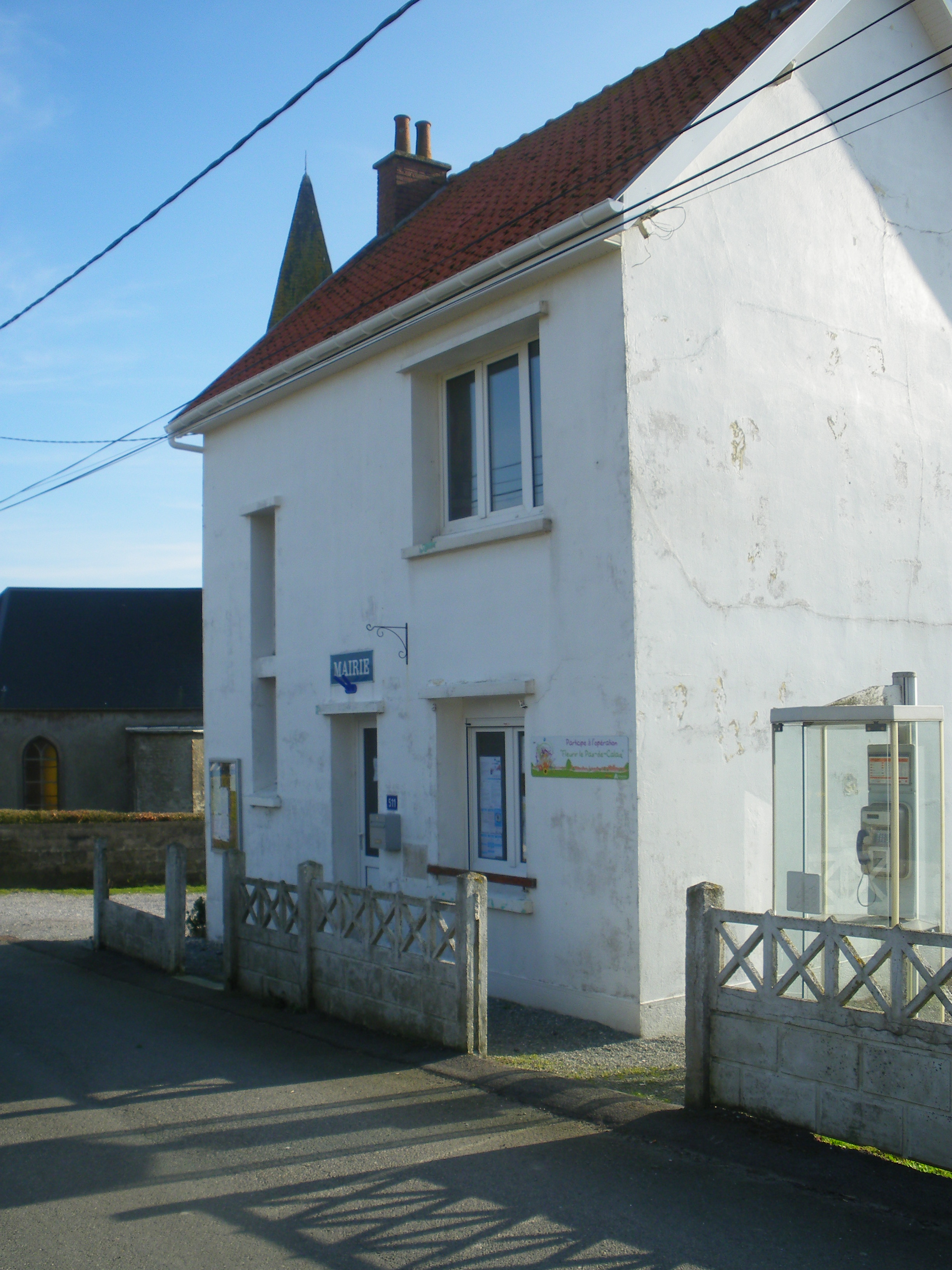 Vue de la mairie de Leubringhen.